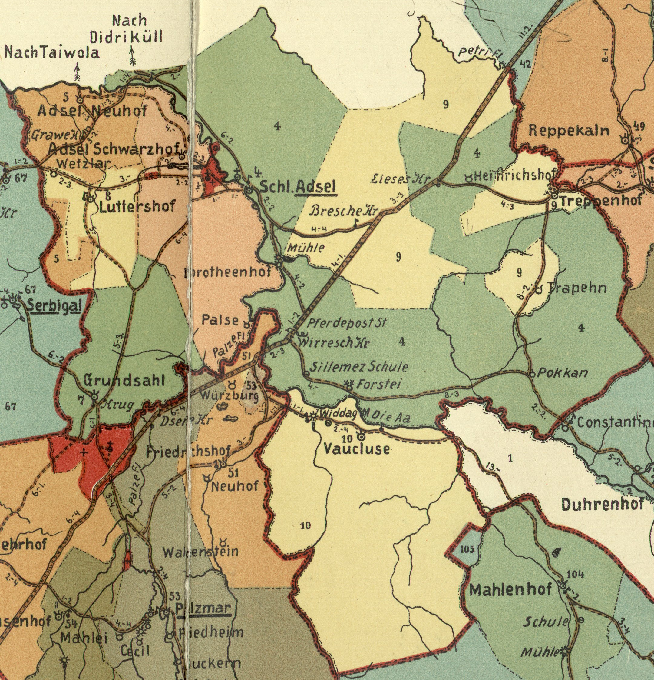 Koivaliina kihelkonna mõisad 1904. aasta kaardil.